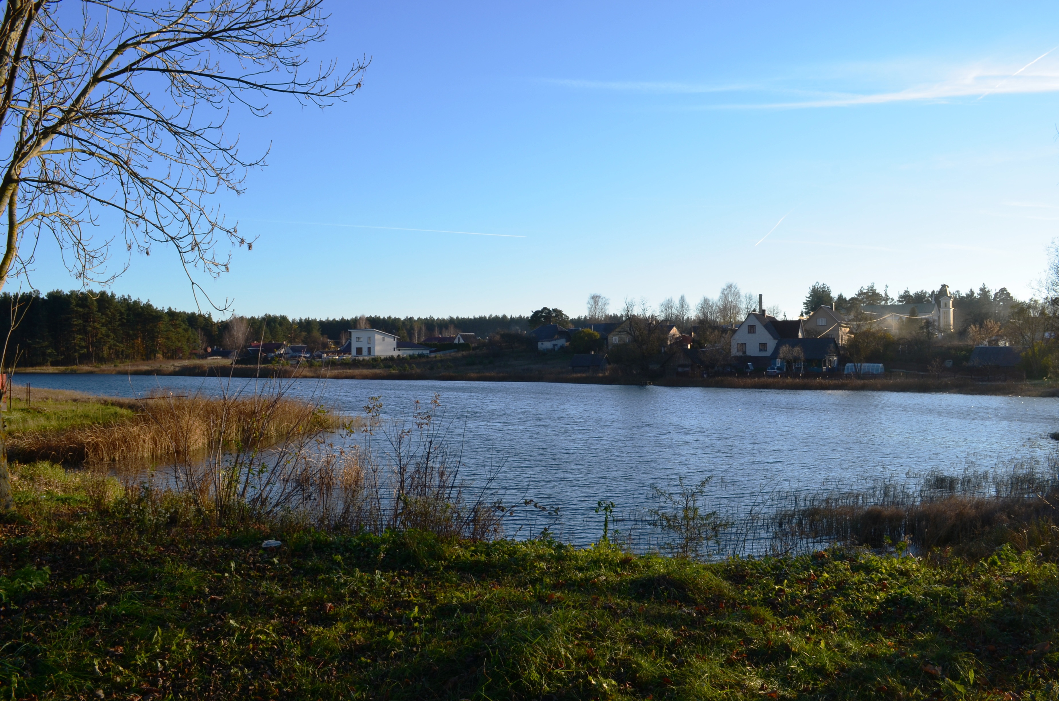 Muknos upelio tvenkinys, Mickūnai, Vilniaus raj.